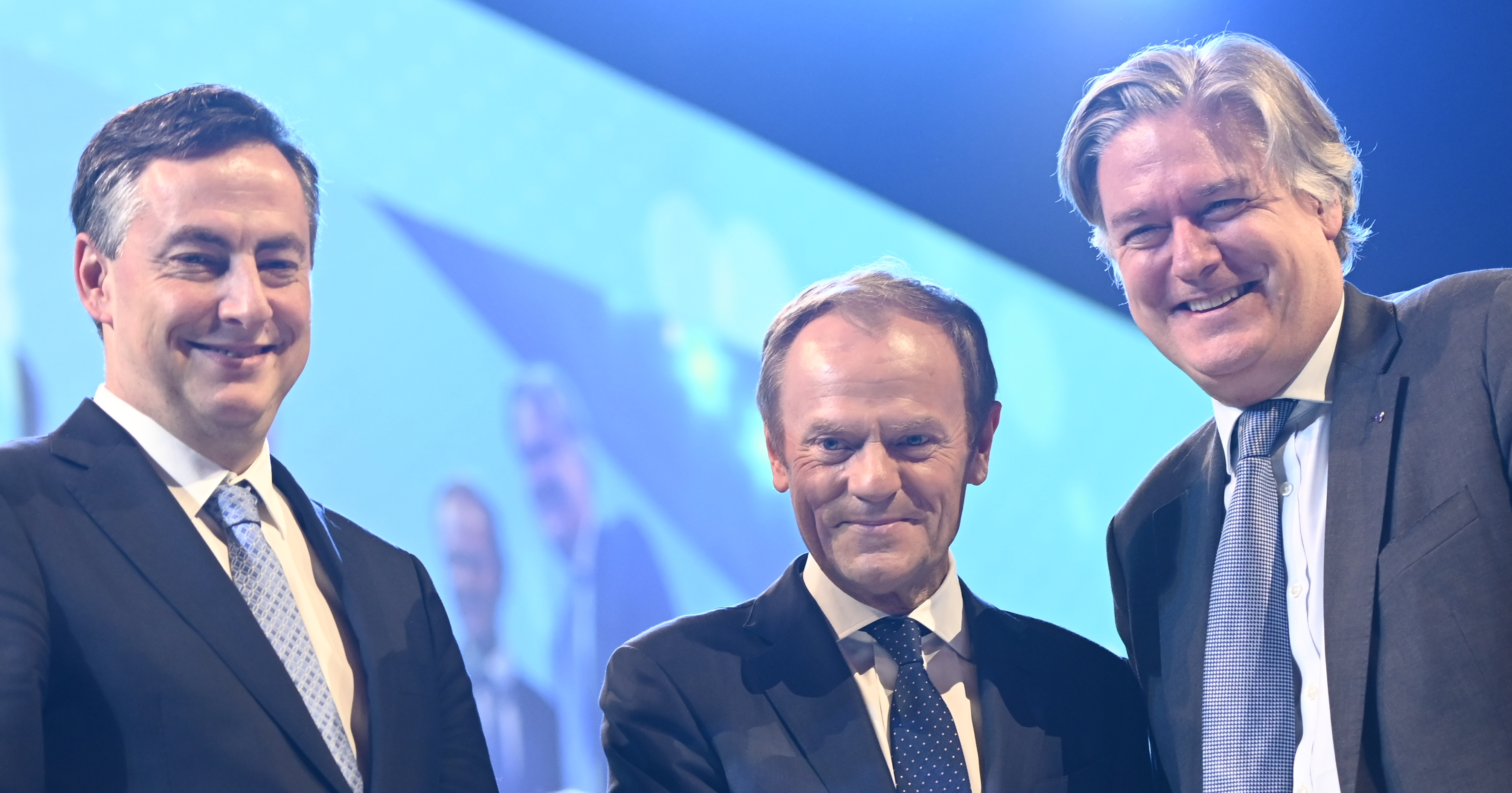 20-21 November 2019